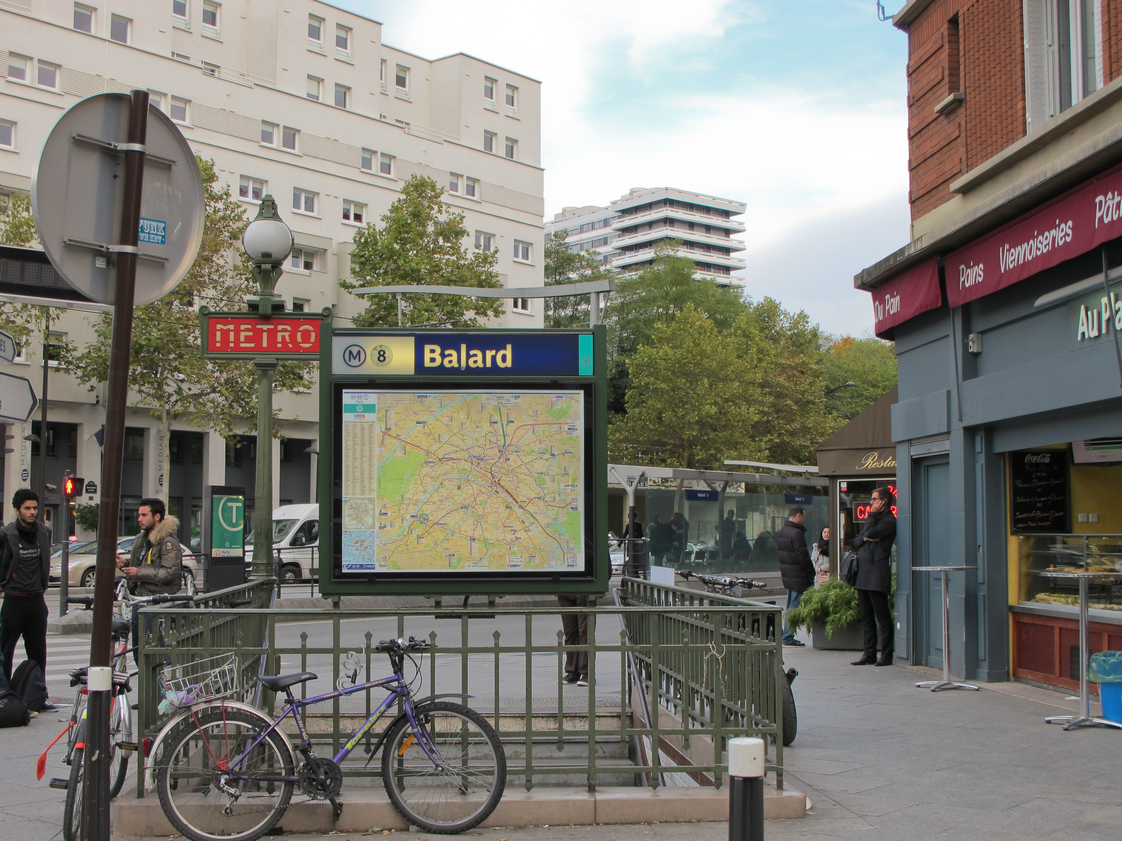 Station de métro Balard, ligne 8 du métro de Paris- Paris, France